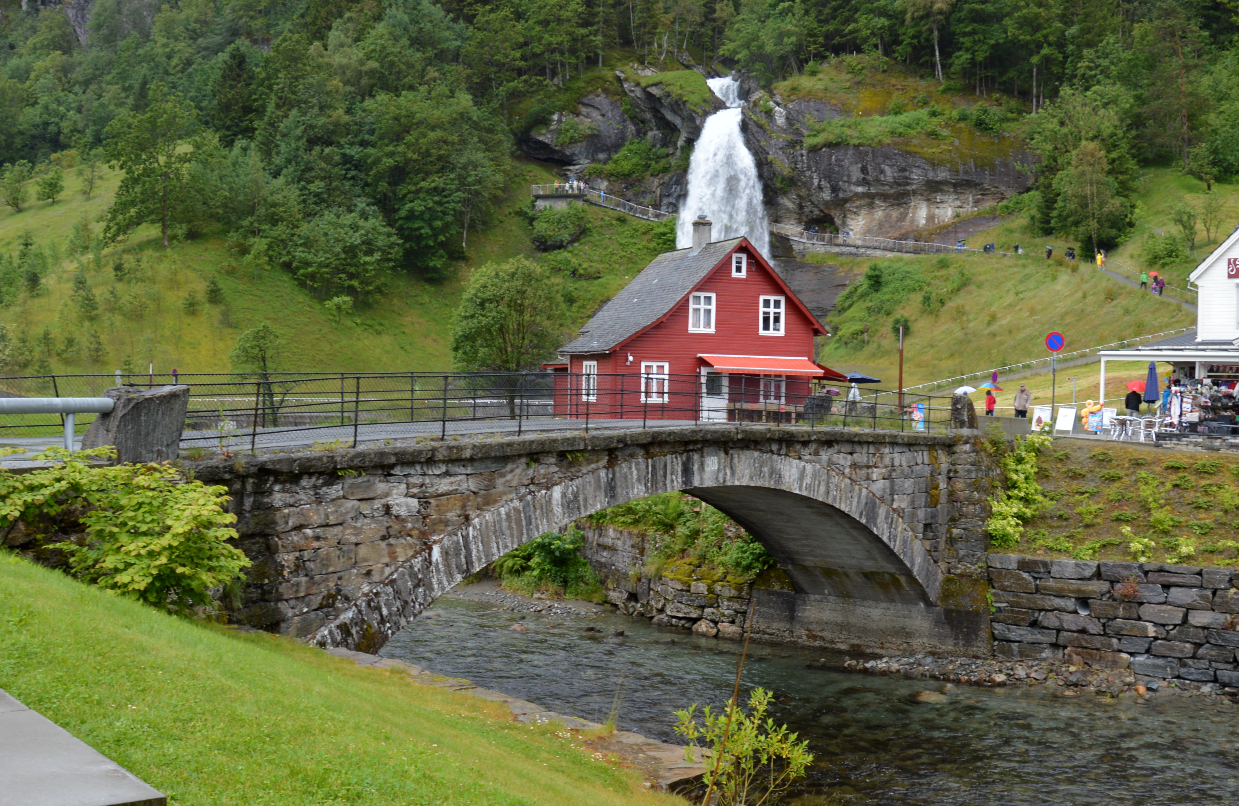 Steinsdalsbrua